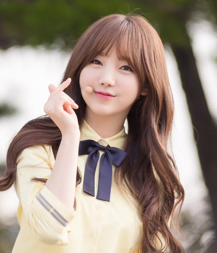 151023 러블리즈 뮤직뱅크 미니팬미팅 - 02